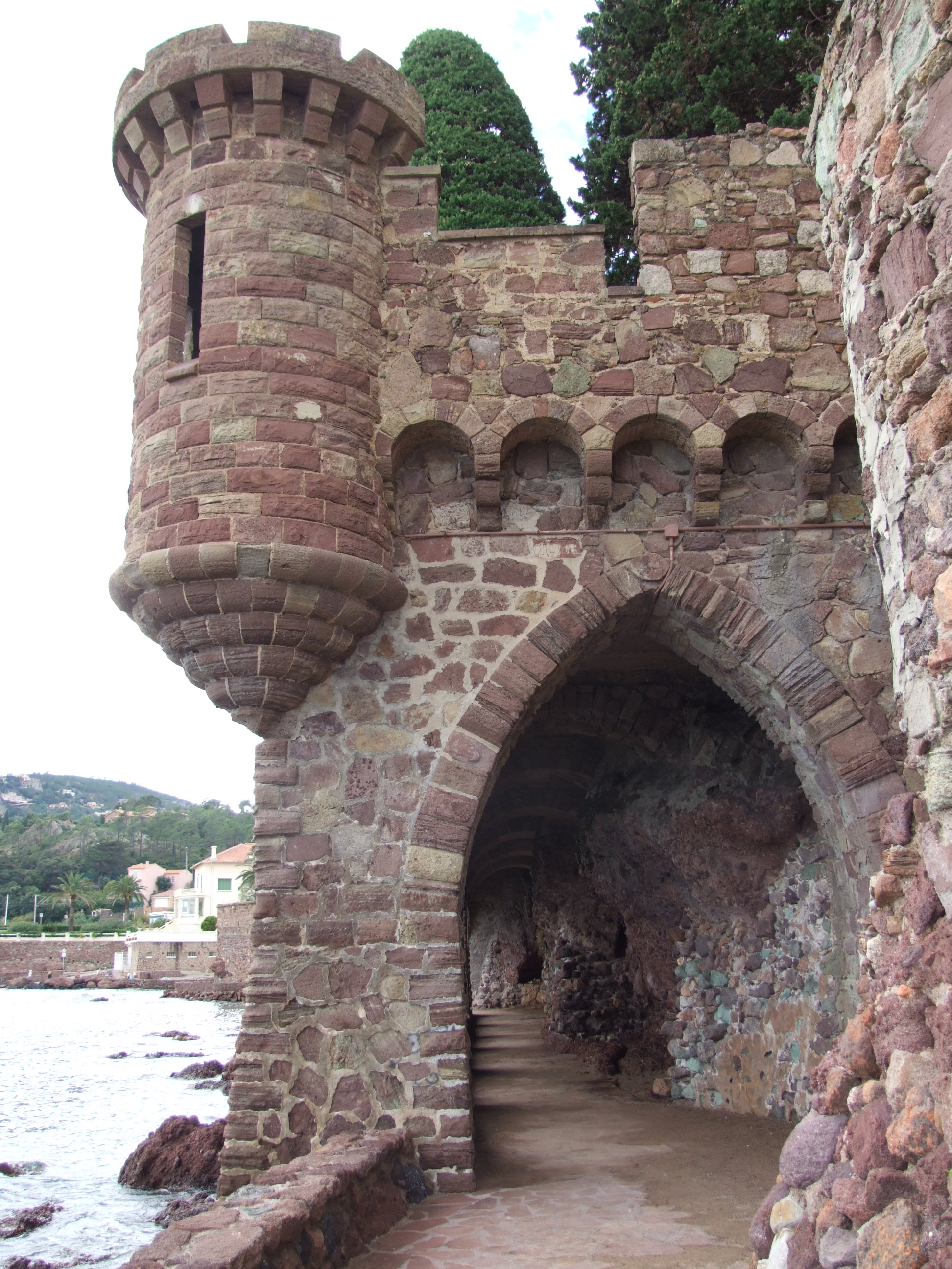 Bartizan - Château de Mandelieu-la-Napoule, FRANCE